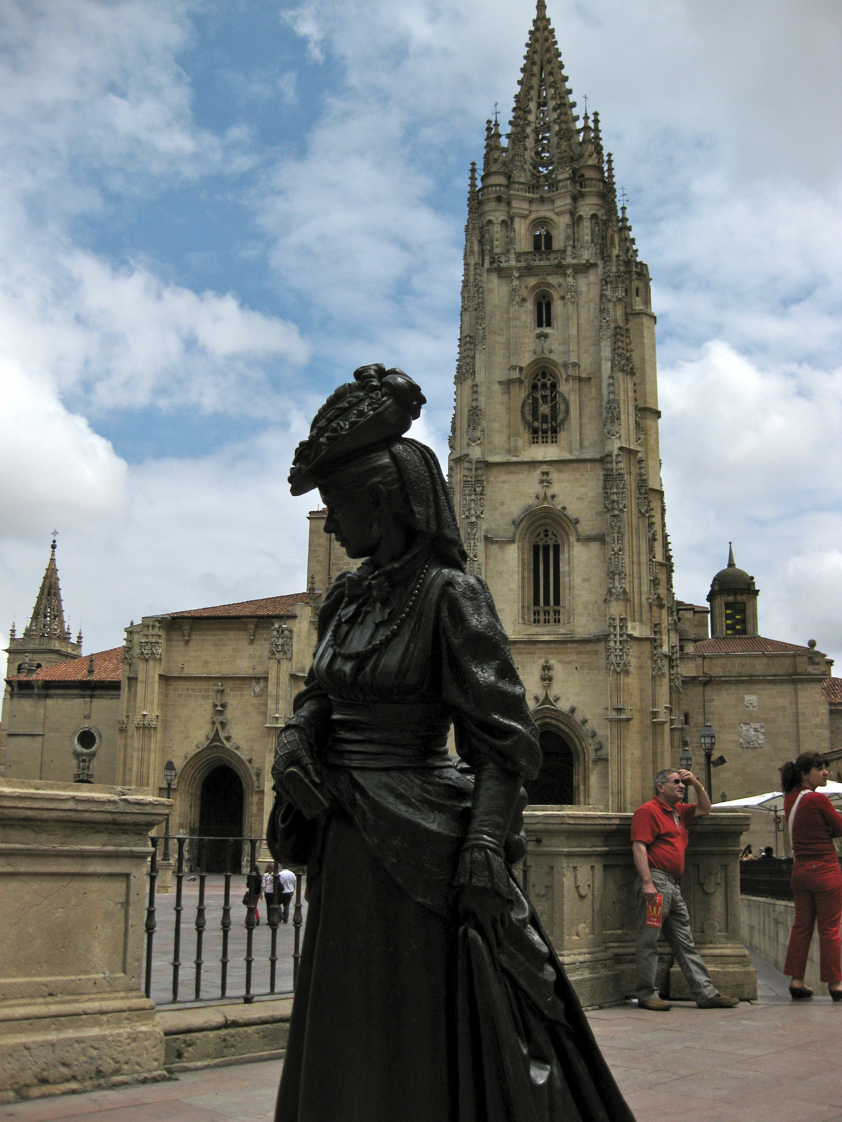 La Regenta, Renada